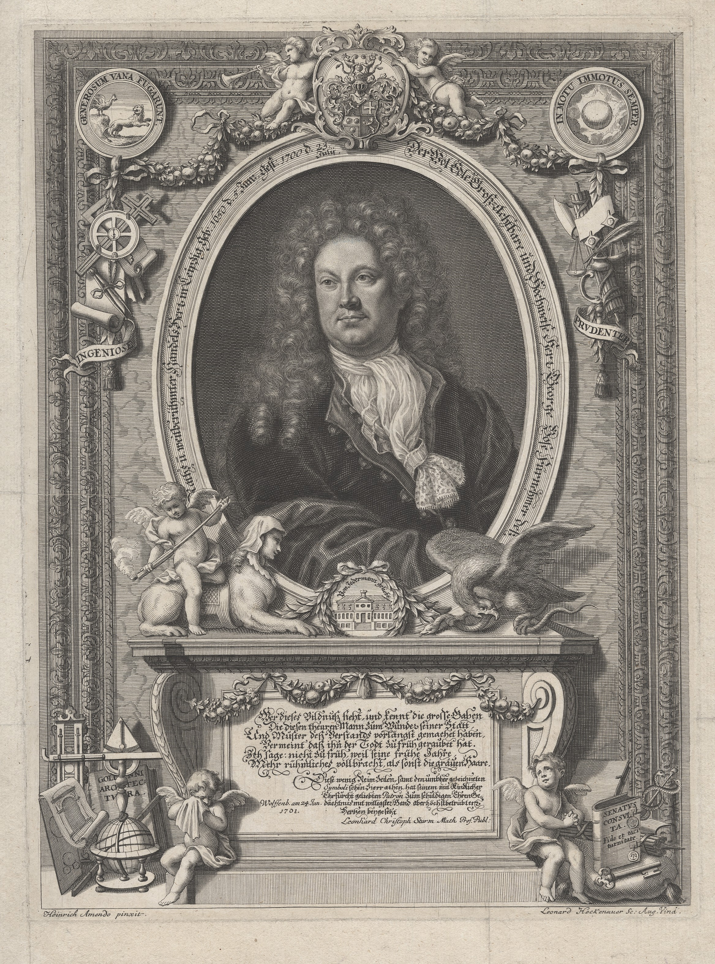 Der Leipziger Handels- und Ratsherr Georg Bose, Kupferstich von Leonard Heckenauer nach einem Gemälde von Heinrich Am Ende